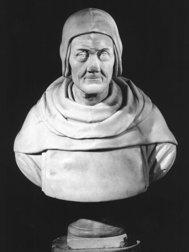 Busto di Fra Mauro Camaldolese, opera di Giuseppe Soranzo del 1881. Il busto fa parte del Panteon Veneto, conservato presso Palazzo Loredan di Campo Santo Stefano a Venezia.